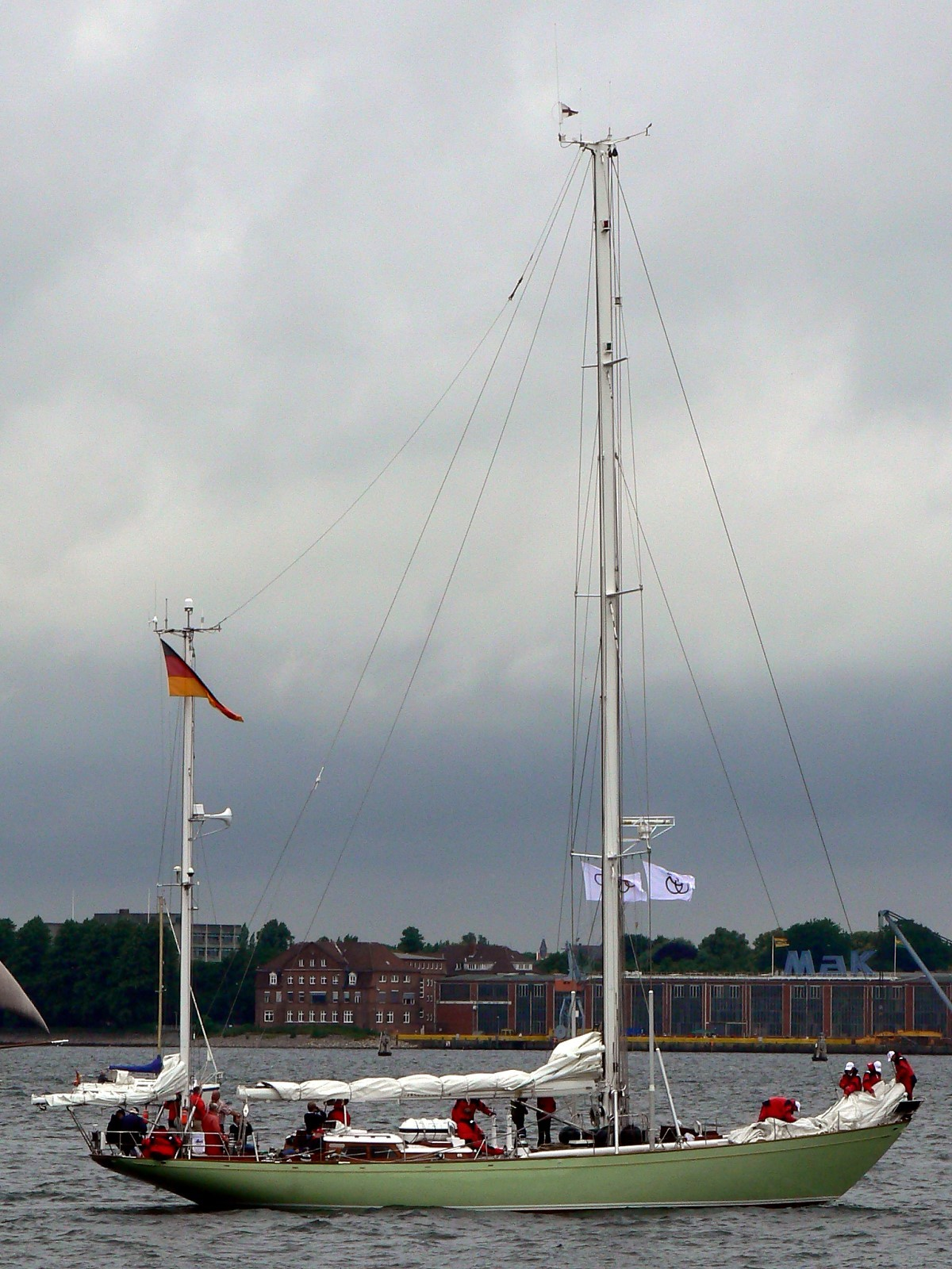 Die Segelyacht Germania VI bei der Windjammerparade auf der Kieler Woche 2008.